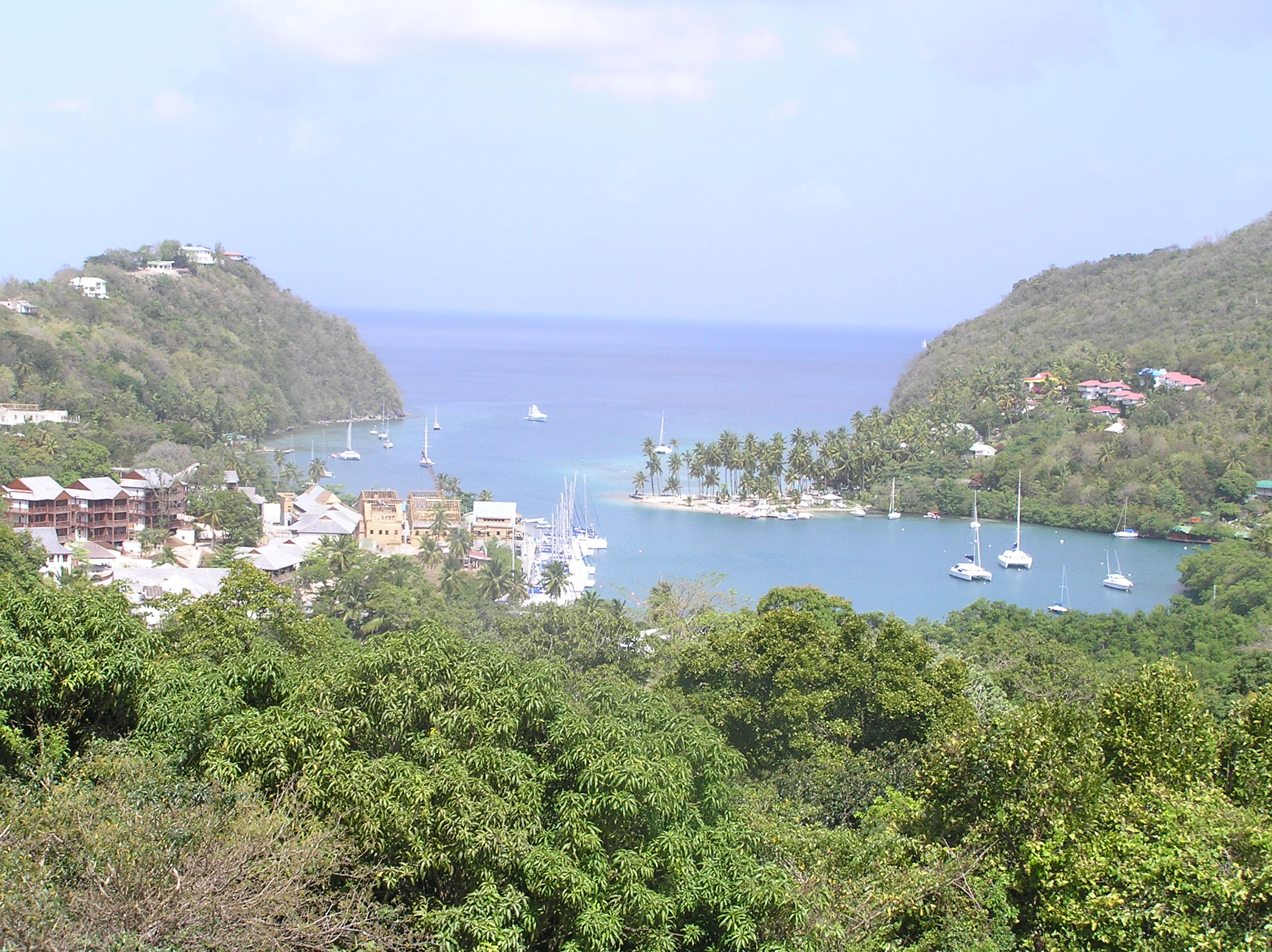 Marigot Bay, St. Lucia.